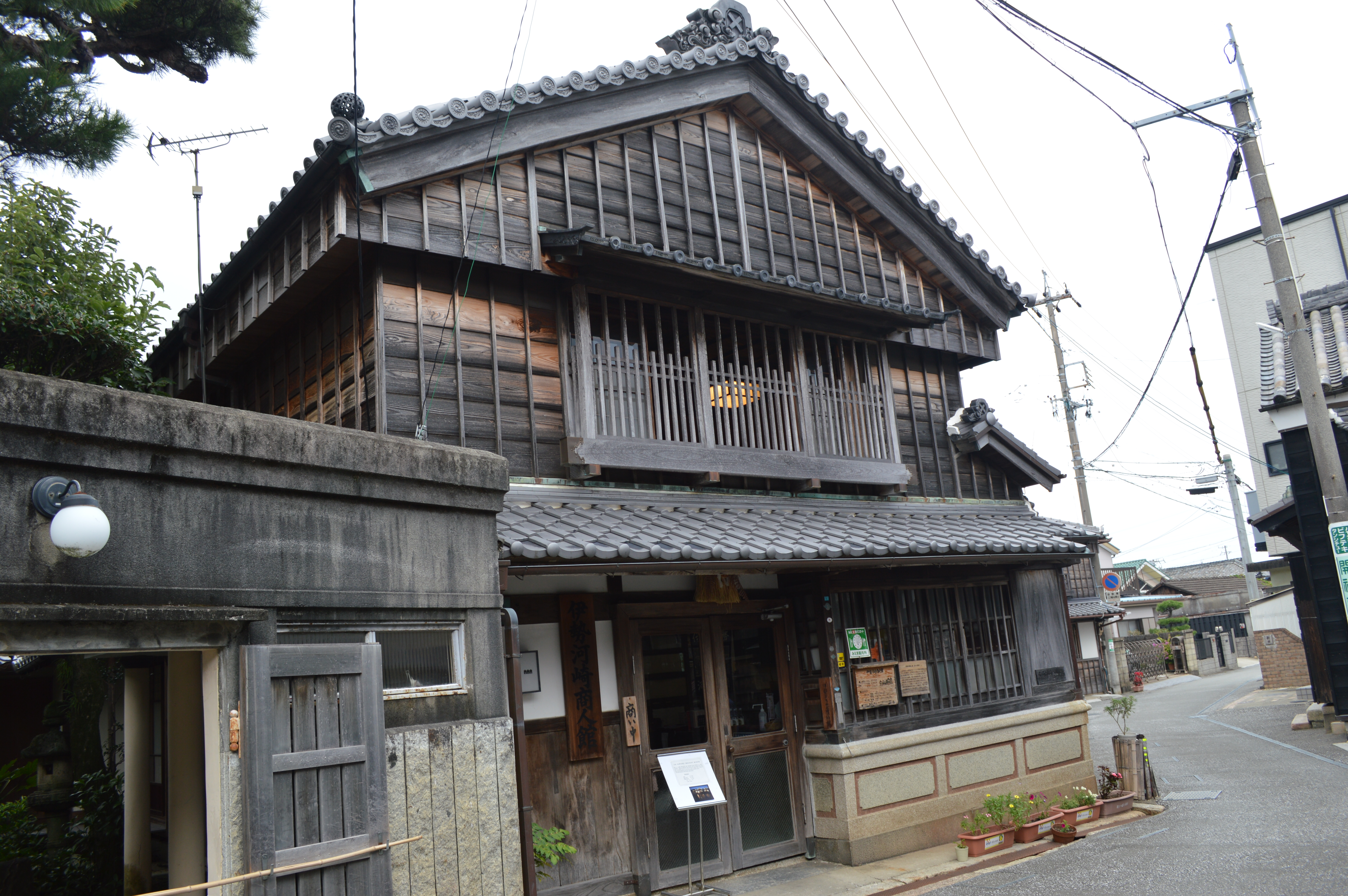 伊勢河崎商人館の外観